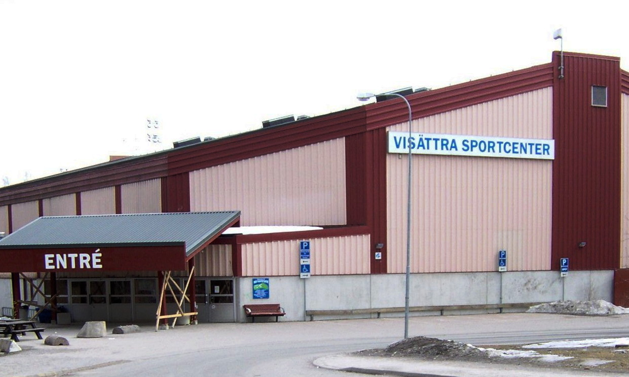 Visättra sportcenter i Flemingsbergs kommundel i Huddinge kommun strax söder om Stockholm